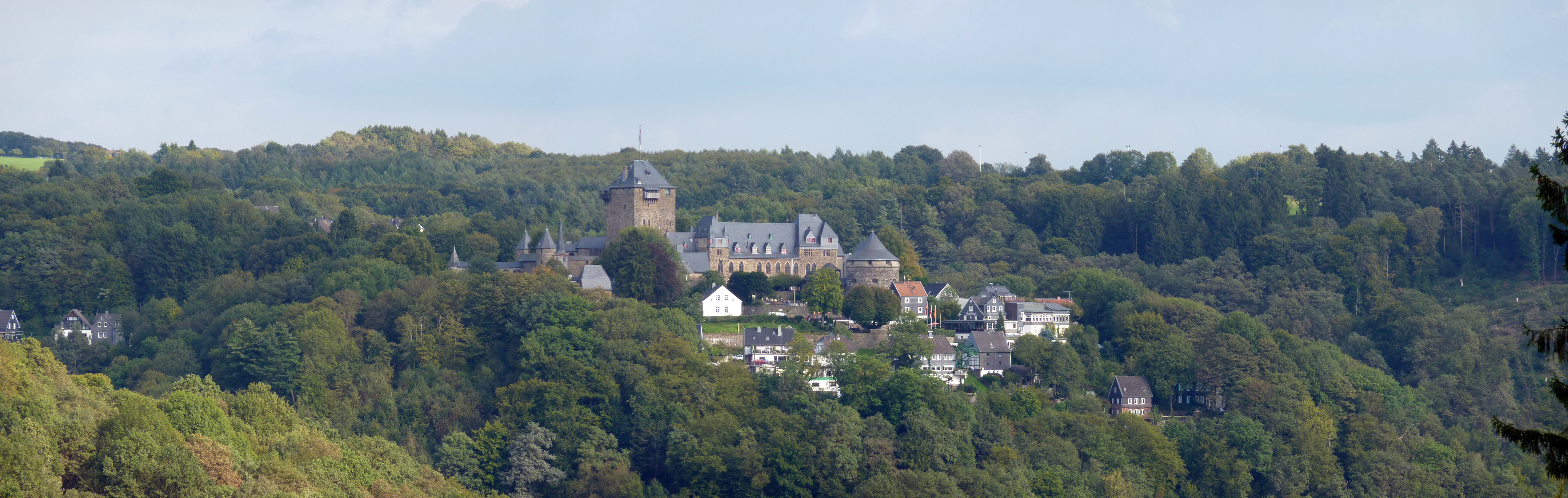 Schloss Burg in SolingenThis is a photograph of an architectural monument., no. 25